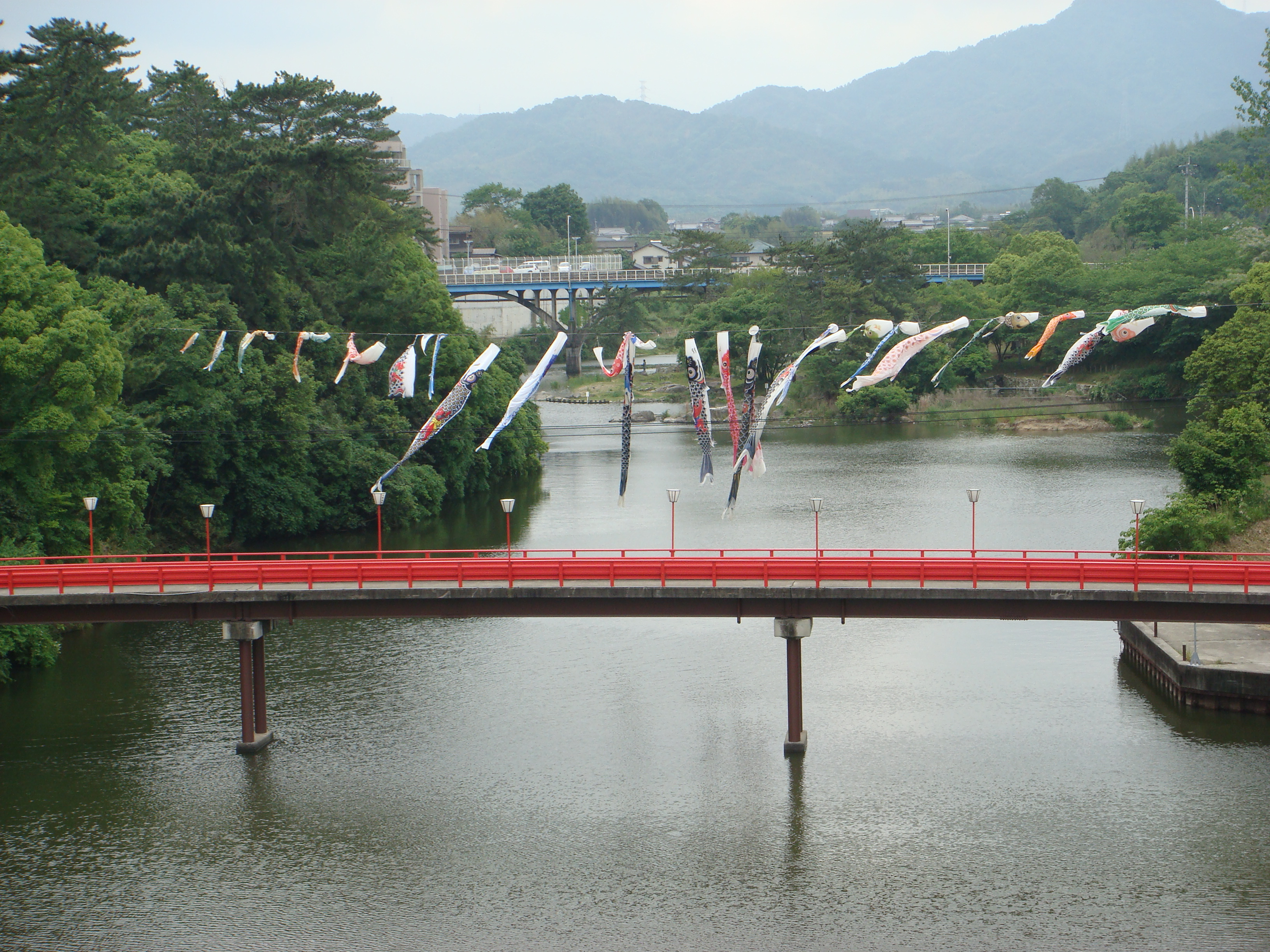 香川県道の駅滝宮付近の綾川